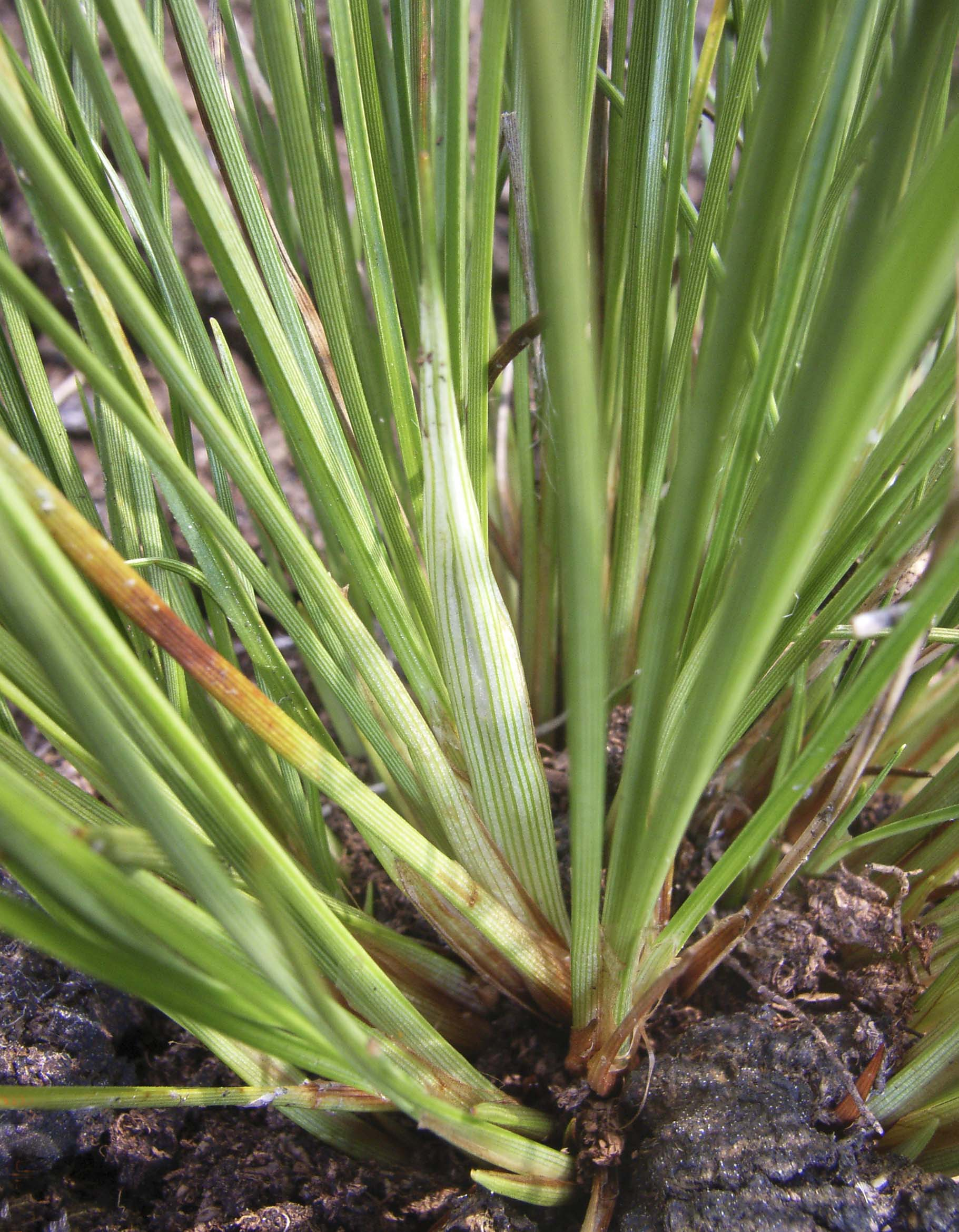 Blattscheiden des Scheiden-Wollgrases (Eriophorum vaginatum), NSG Hahnenmoor (Niedersachsen)